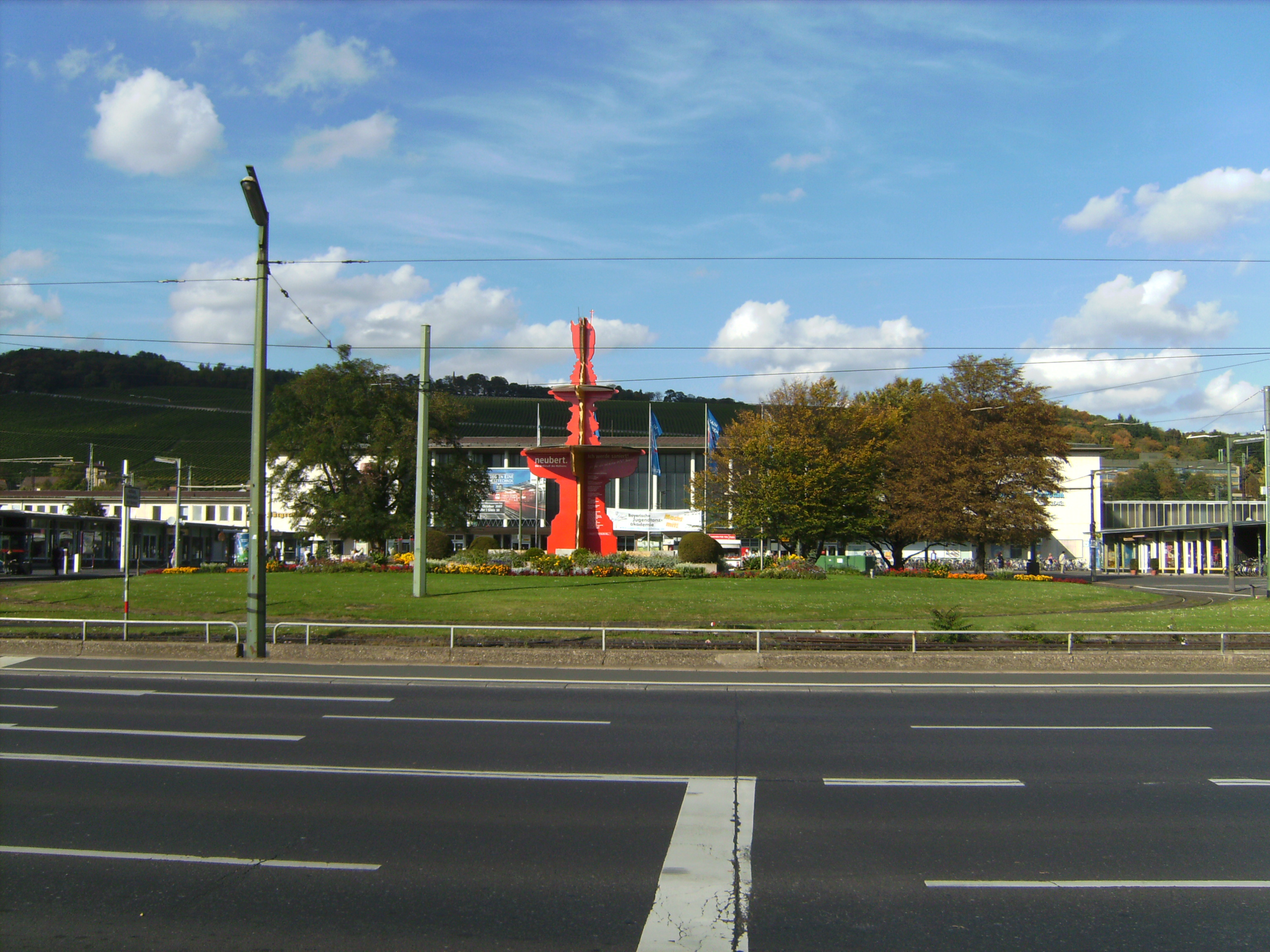 Der Bahnhofsvorplatz in Würzburg, in der Mitte des Platzes die Brunnen-Attrappe, die während der Sanierung des historischen Kiliansbrunnens aufgestellt wurde. Im Vordergrund der Röntgen- bzw. Haugerring, im Hintergrund das Empfangsgebäude des Hauptbahnhofs und die nördlich des Bahnhofs beginnenden Weinberge.